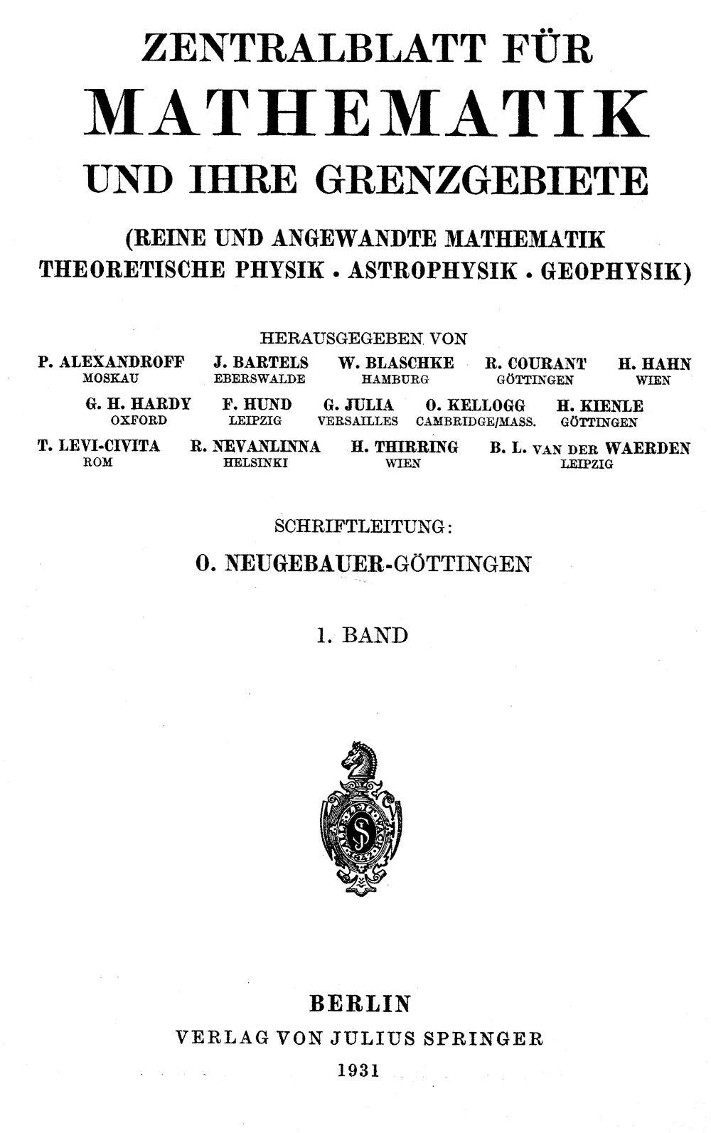 Titelseite der Zeitschrift / Title page of the periodical